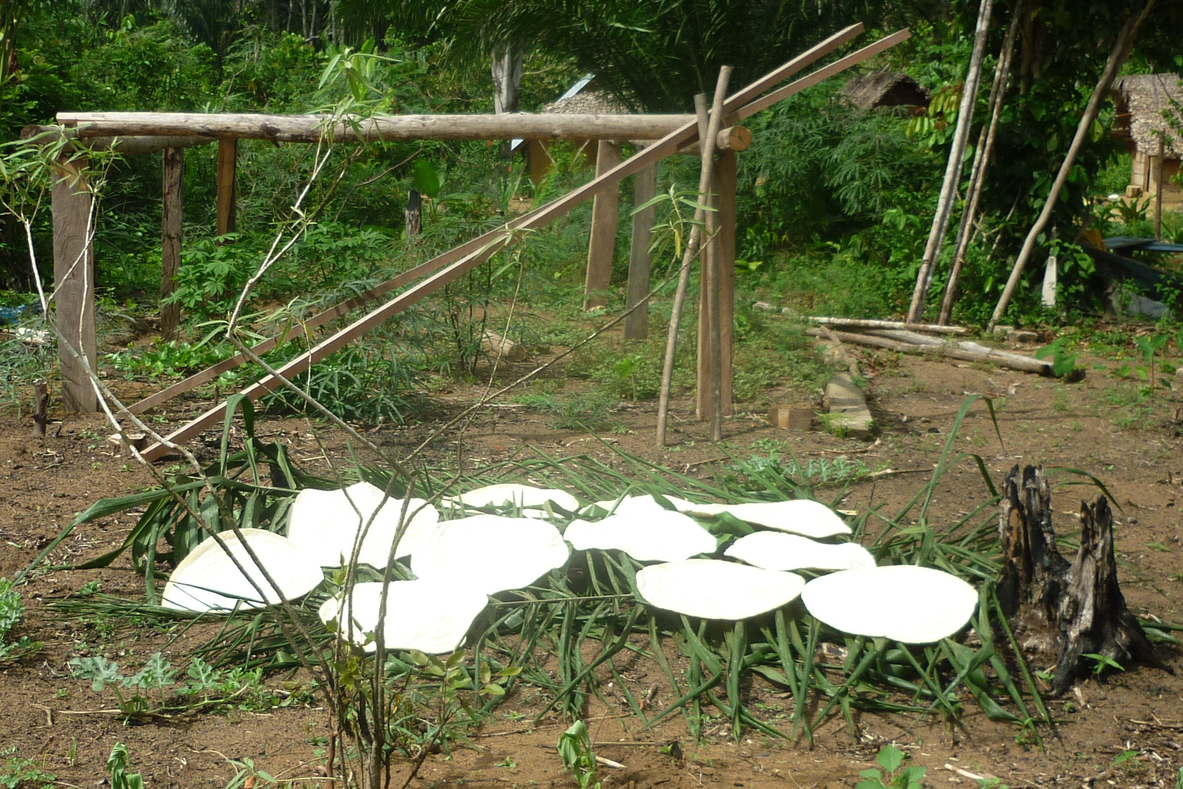 cassave brood